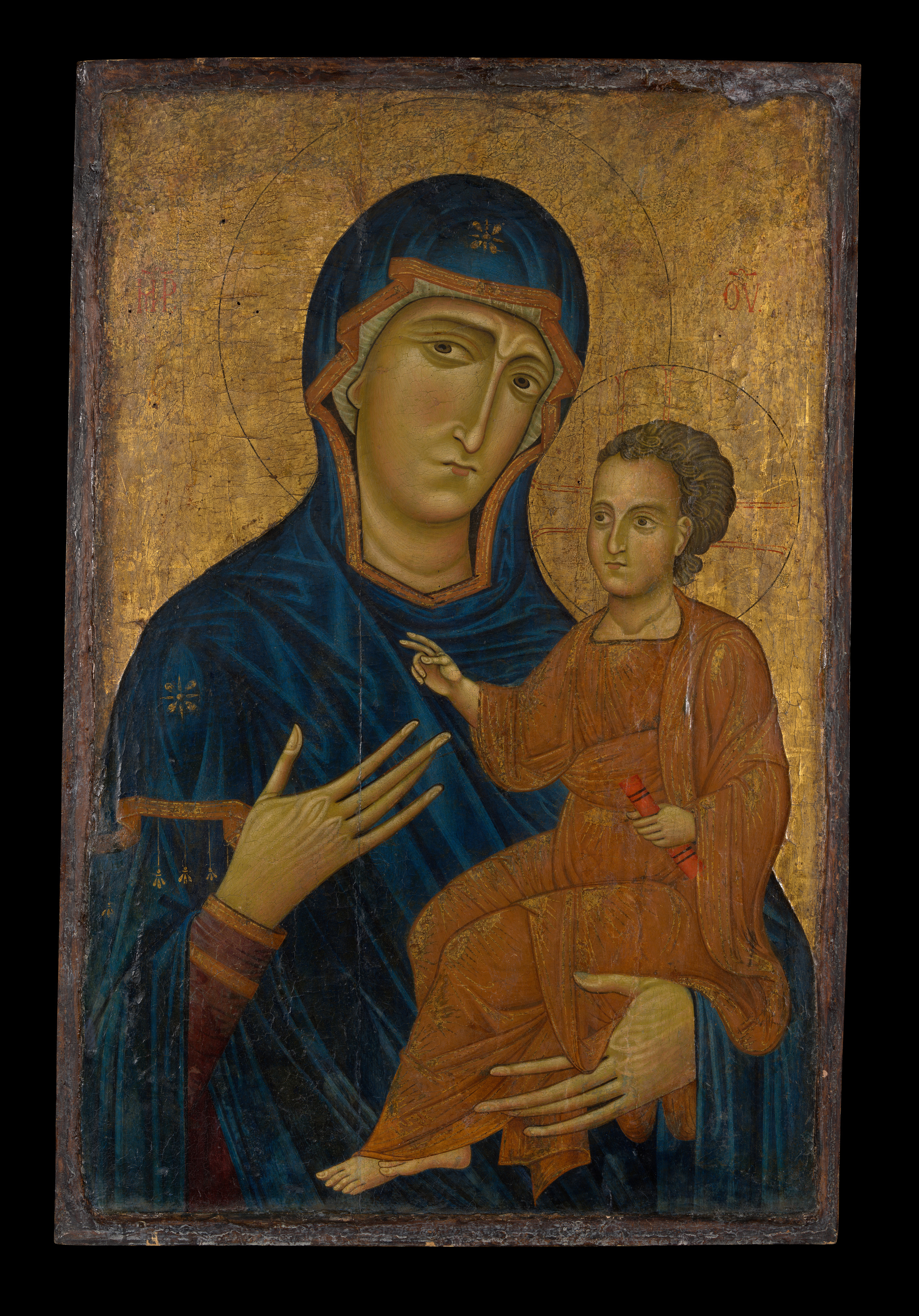 Berlinghiero